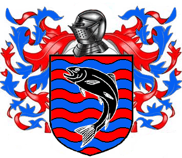 Estandarte creado con photoshop usando material libre o creado ex profeso por mi e inspirado por las obras de Canción de Hielo y Fuego.